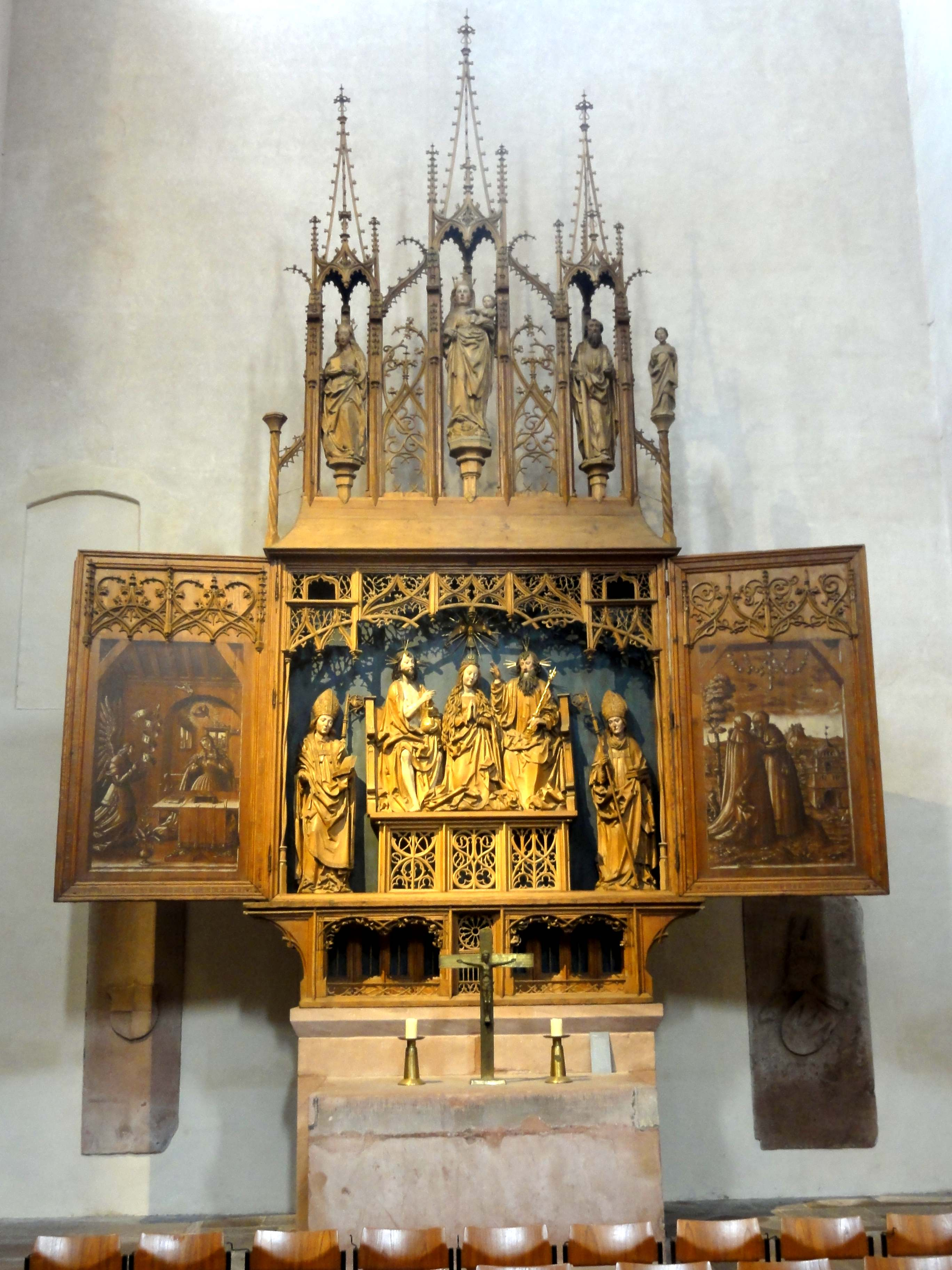 Klosterkirche, Innenansicht - Beschreibung siehe Dateititel.